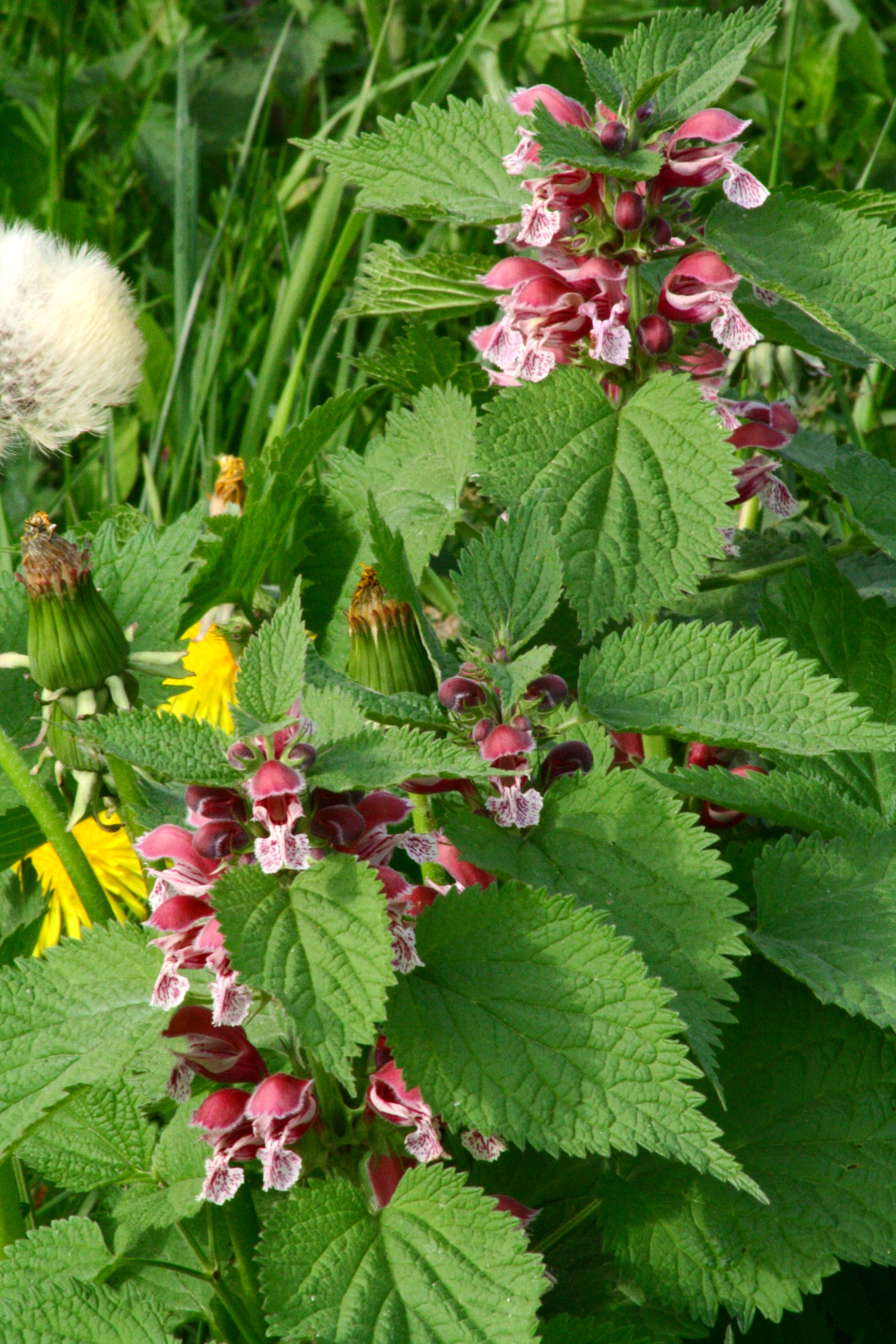 Falsa ortica maggiore - Località : Casteldardo, Trichiana (BL), 389 m s.l.m.